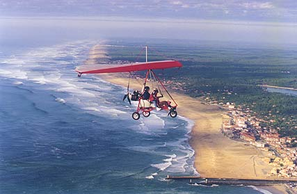 vol ULM AQUITAINE